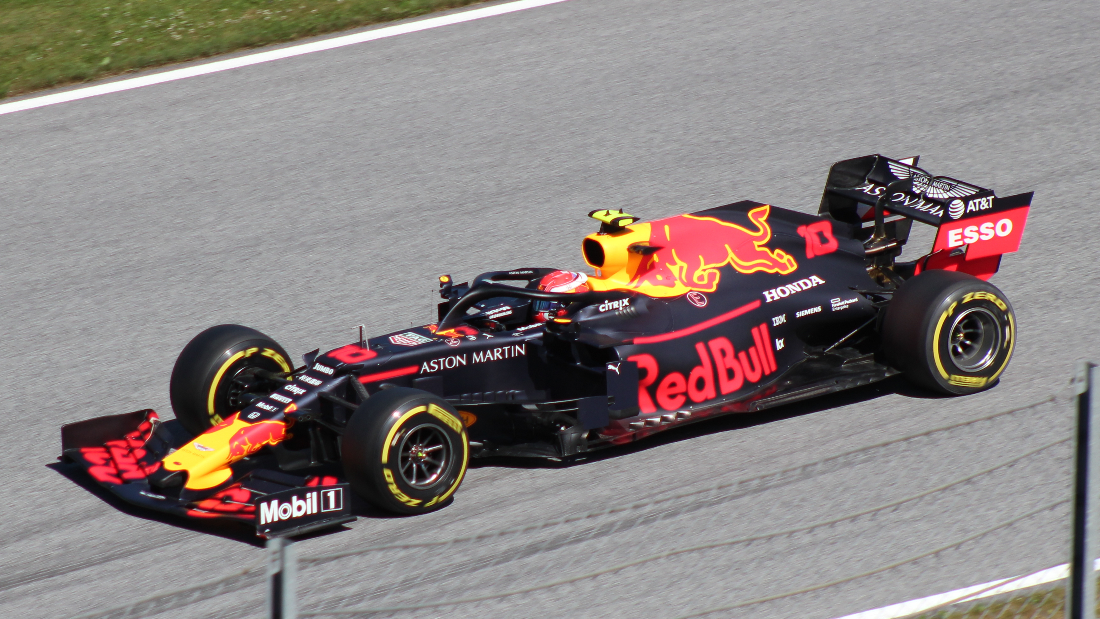 Gasly beim Rennwochenende in Österreich 2019